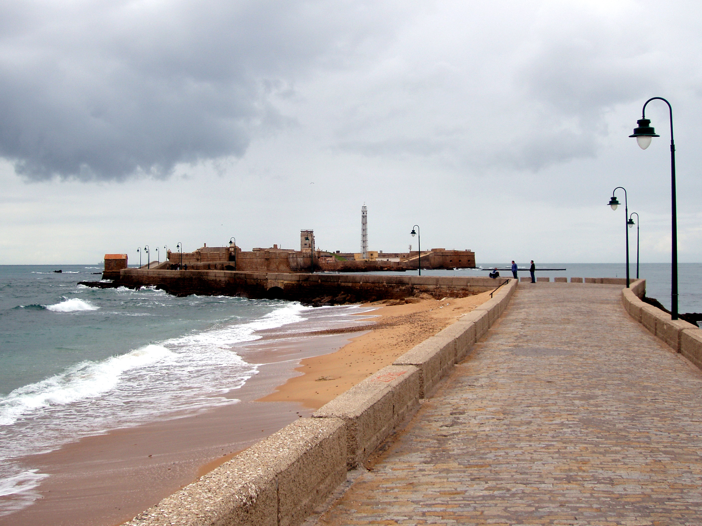 Castillo de San Sebastián, Paseo De Fernando Quiñones. Faro Castillo de San Sebastián o Faro de Cadiz (NGA:113-3940).